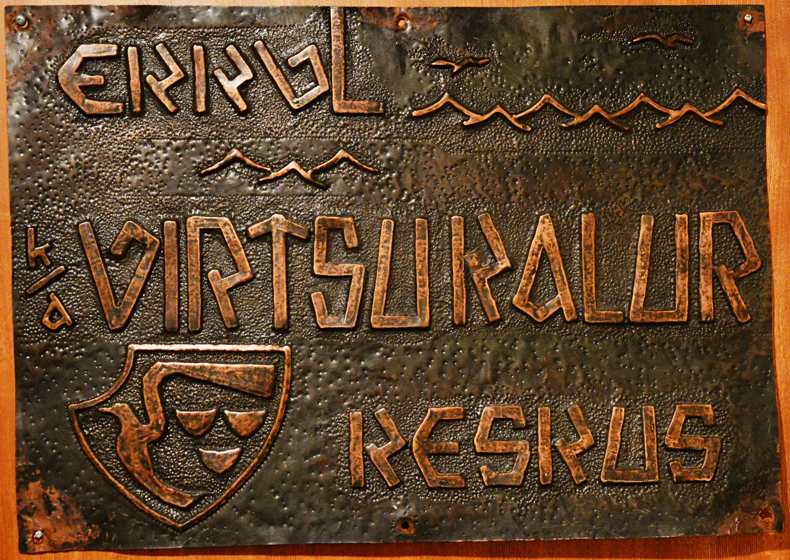 Virtsu Kaluri silt Virtsu seltsimajas Virtsu Harrastusmuuseumi uksel.